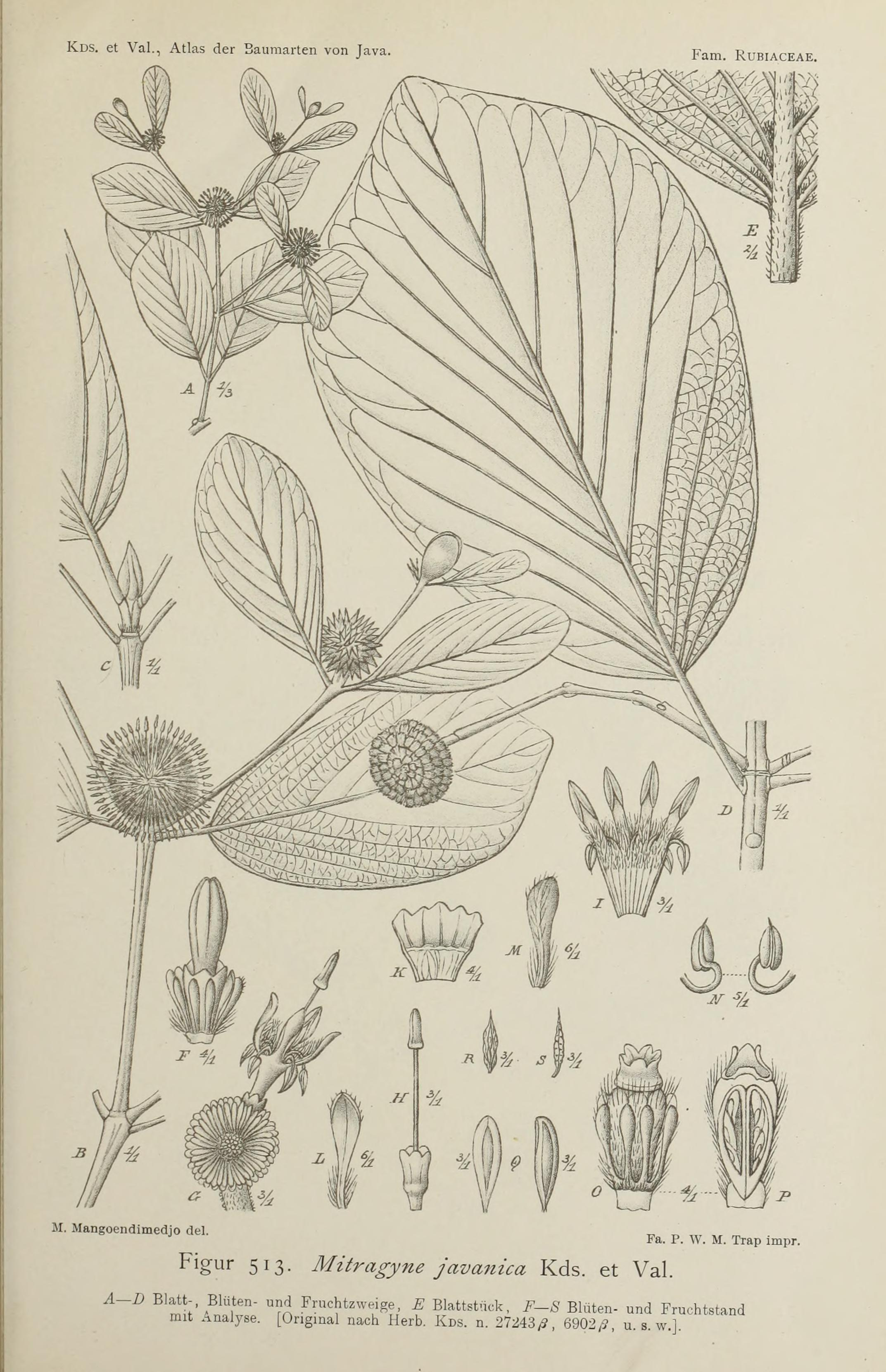 Atlas der baumarten von Java : im anschluss an die "Bijdragen tot de kennis der boomsoorten van Java" / zusammengestellt von dr. S.H. Koorders und dr. Th. Valeton ; mit unterstützung der Niederländsch- indischen regierung ; Herausgegeben von dr. S.H. Koorders.